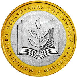 Юбилейная монета. 2002г. 10руб. Министерство образования и науки Российской Федерации. Реверс.